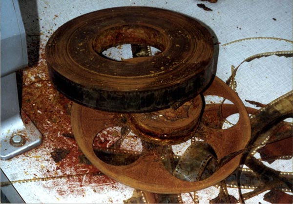 Film affetto da deterioramento da sindrome dell'aceto